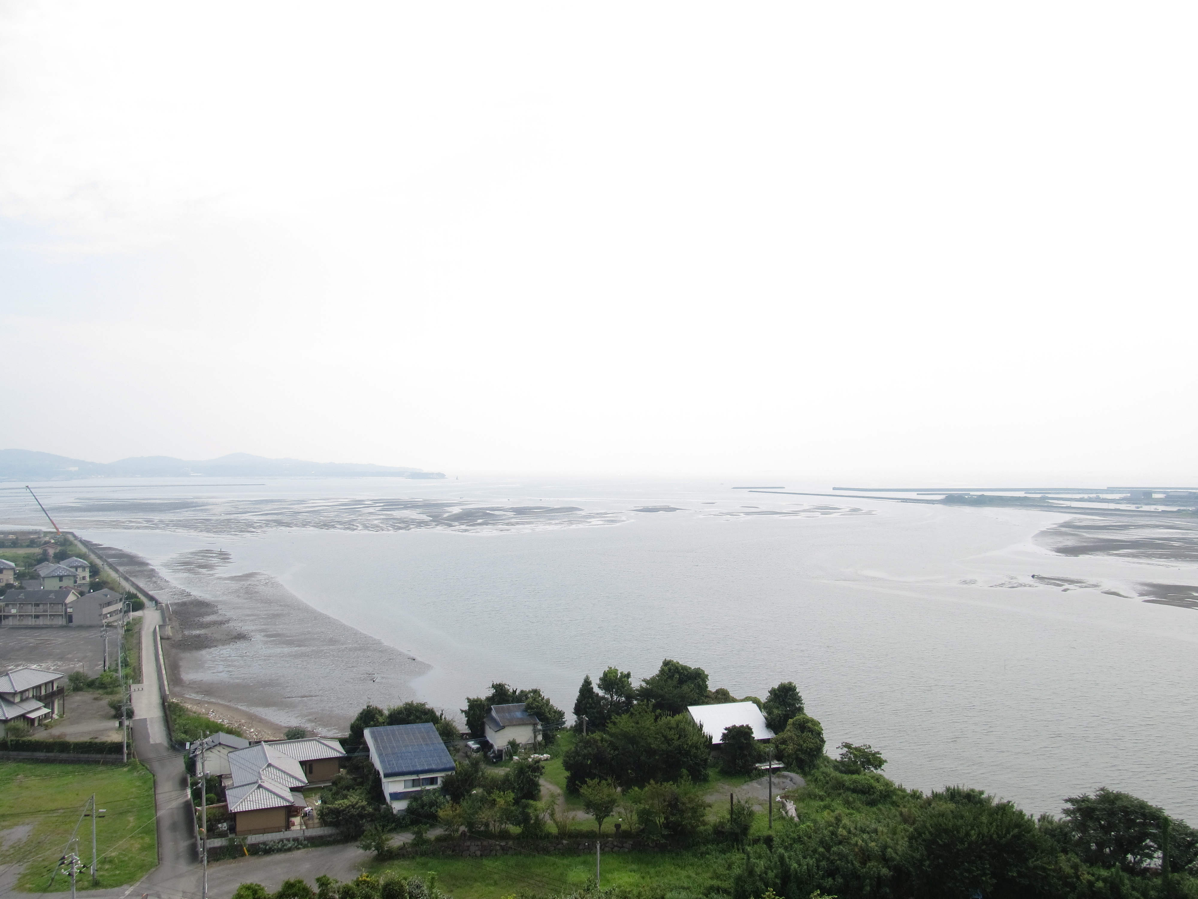 大分県杵築市の守江湾（杵築城跡から撮影）。八坂川が注ぐ。